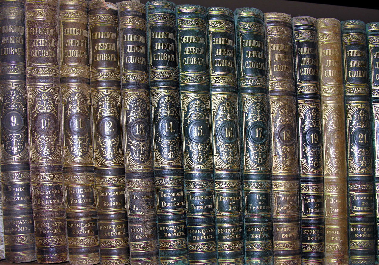 Enciklopedinis Brokhauzo ir Efrono Å¾odynas. Sankt Peterburgas, 1890â€”1907 m., 82 tomai ir 4 papildymÅ³ tomai. Fotografavo: Algirdas, 2006 m. geguÅ¾Ä—s 3 d.